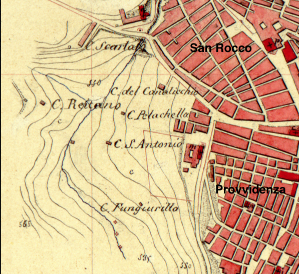 Antico mappale con i quartieri di San Rocco e Provvidenza